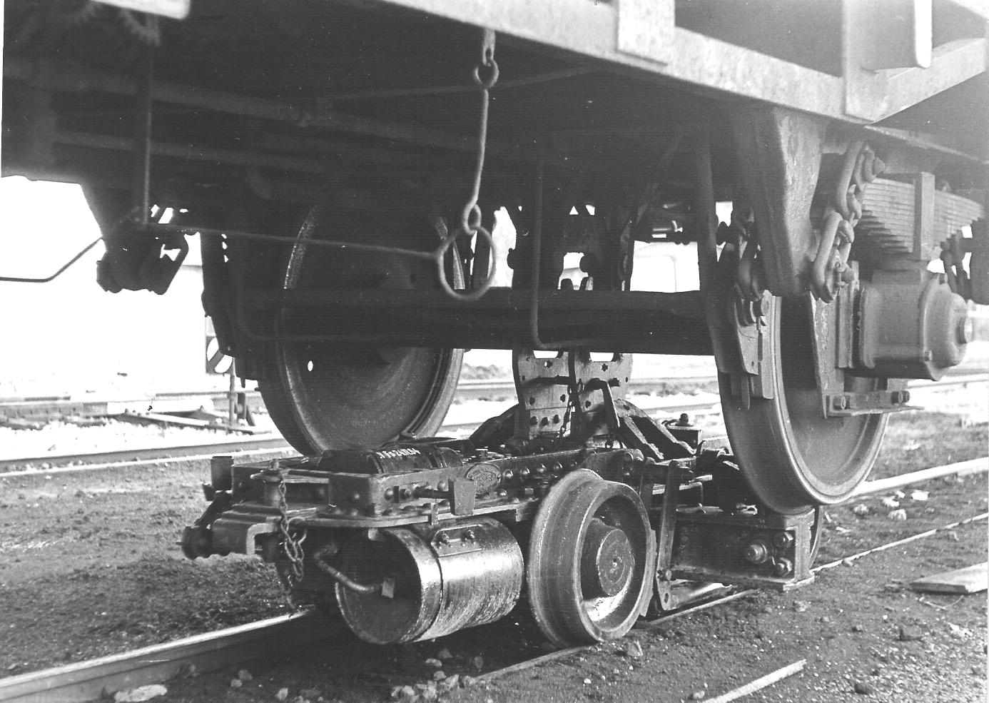 Rollbock in Buchau/Federsee, 750mm Spur